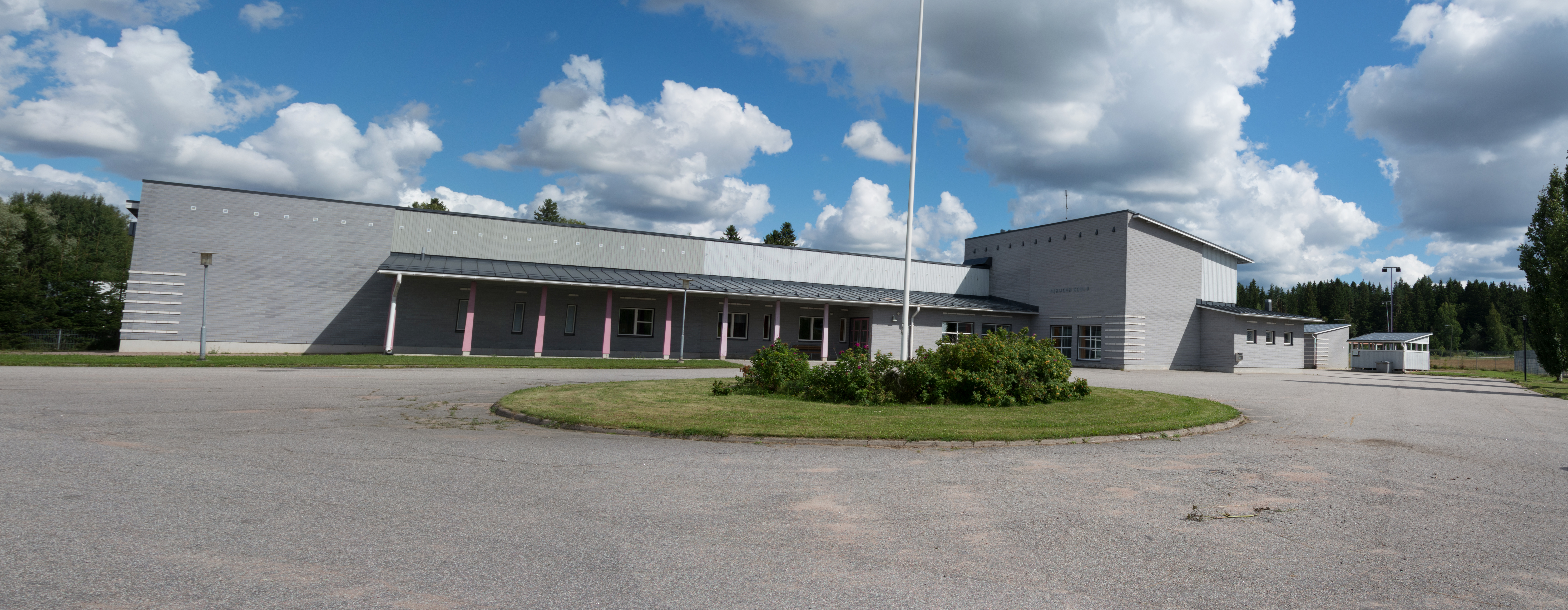 Rekijoen koulu